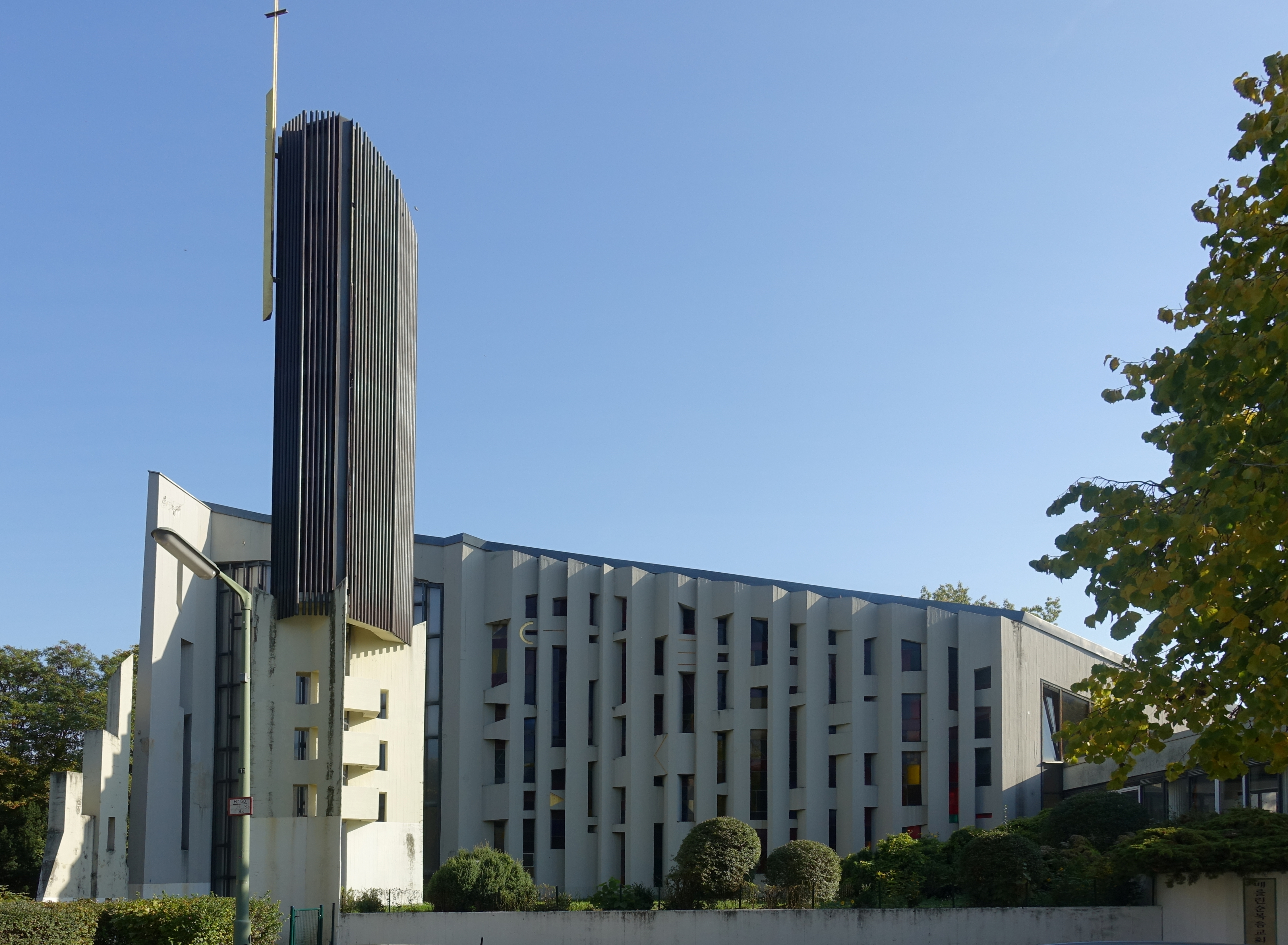 Vor dem Kirchengebäude erhebt sich ein Campanile.